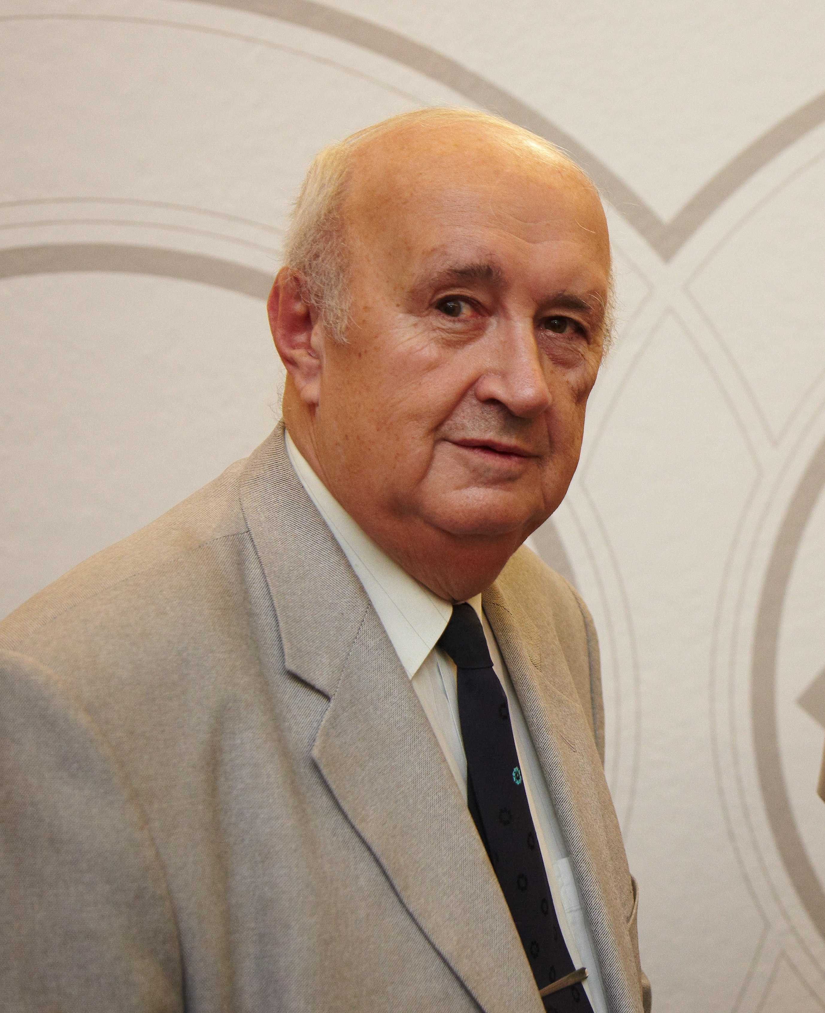 Josef Sůva, ředitel Galerie moderního umění v Hradci Králové v letech 1963 - 1997